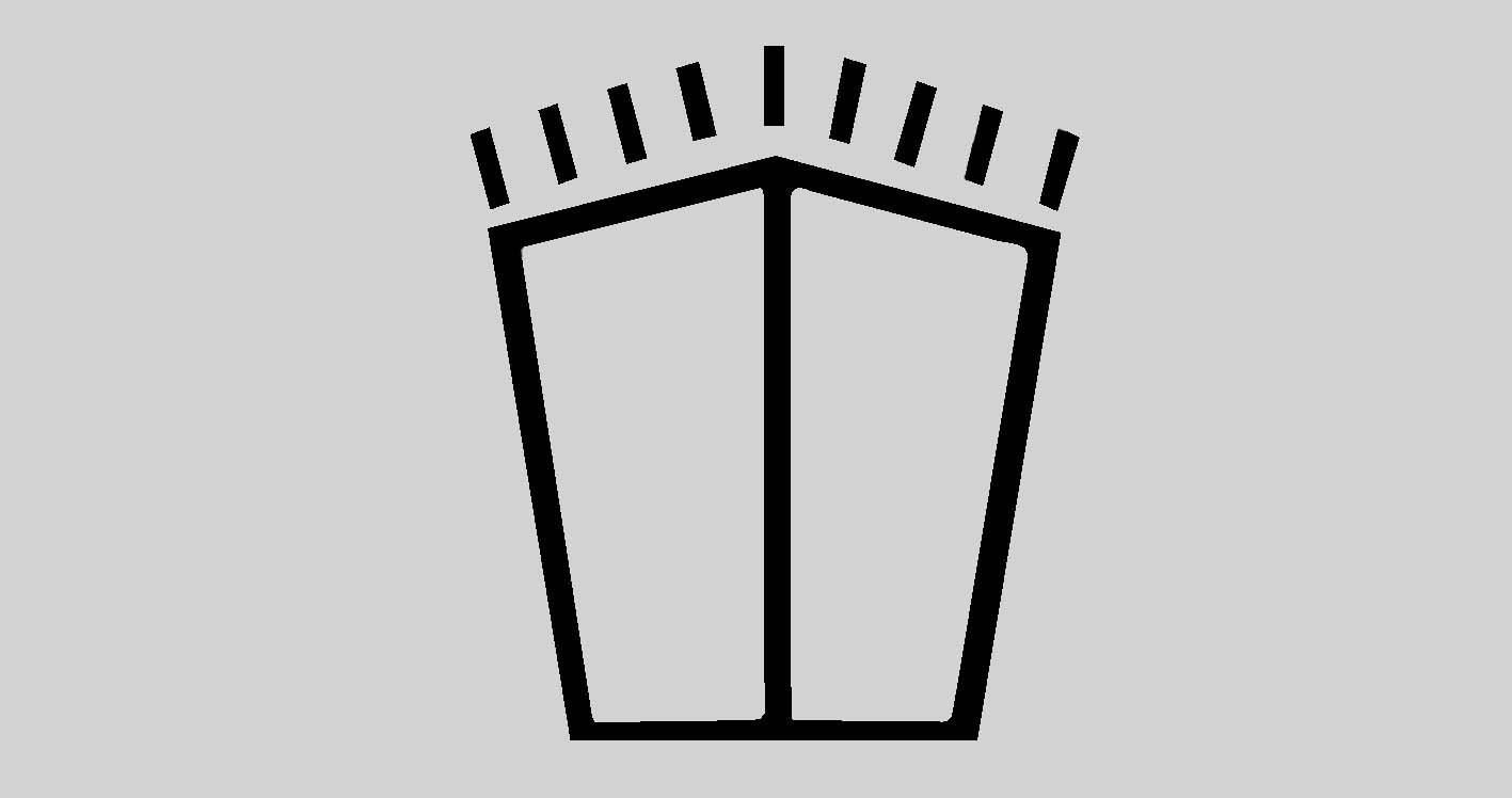 Typologie der podomorphen Petrosomatoglyphen auf Lanzarote nach Hans-Joachim Ulbrich